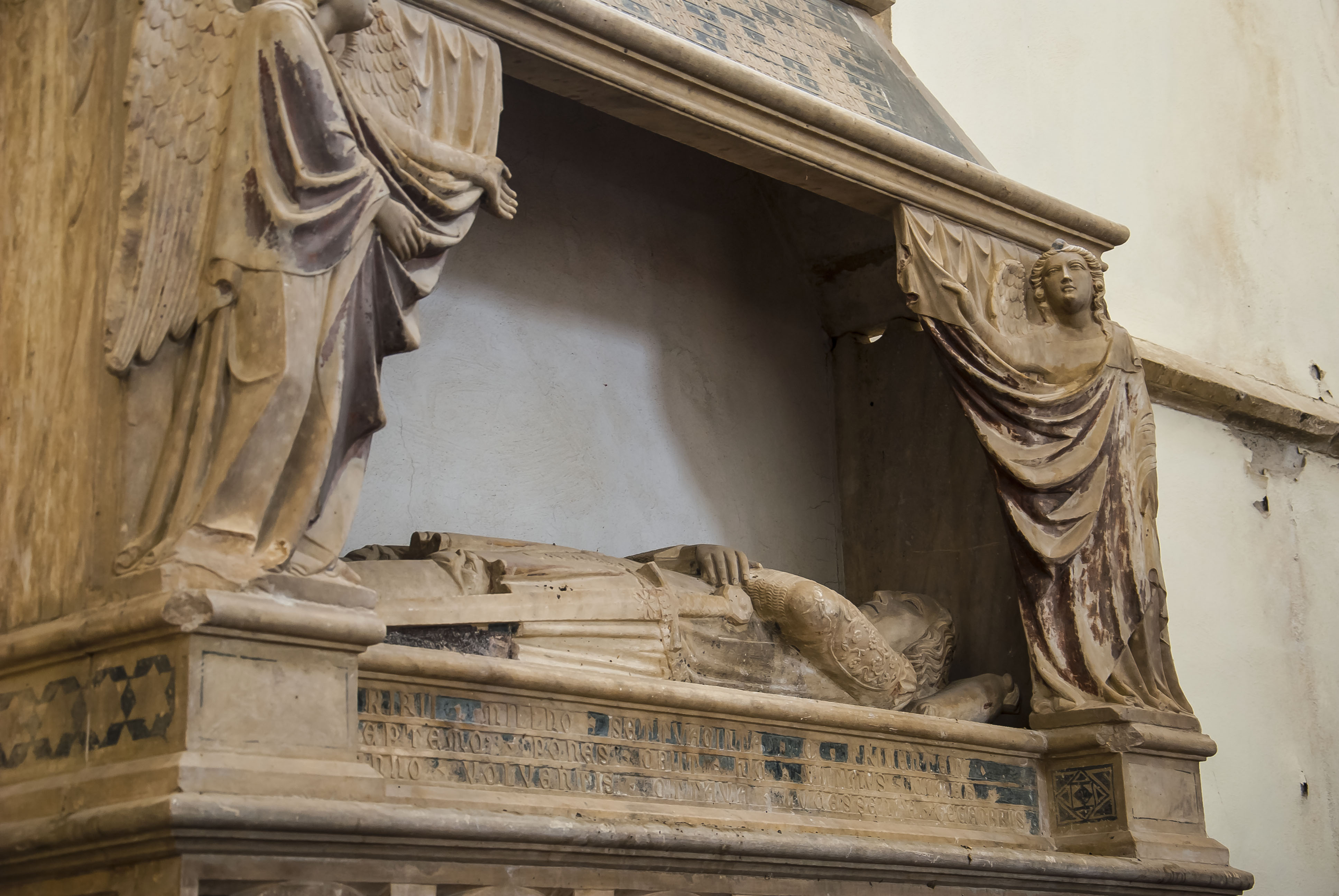 Chiesa di Santa Maria della Consolazione This is a photo of a monument which is part of cultural heritage of Italy.